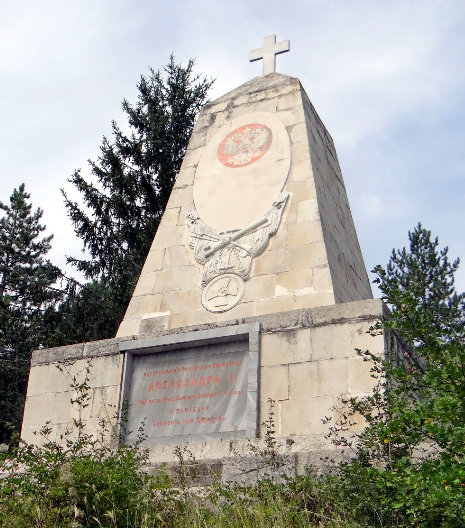 Паметник на победата при село Лом Черковна в чест на 1-ви Невски, 101-ви Пермски, 102-ри Вятски, 125-ти Курски и 126-ти Рилски пехотни полкове, 1-ва батарея от 1-ва артилерийска бригада, 1-ва и 4-та батарея от 26-та артилерийска бригада, 1-ва и 4-та батарея от 32-ра артилерийска бригада, 18-та конно-артилерийска батарея. Намира се на 1 км. източно от селото.